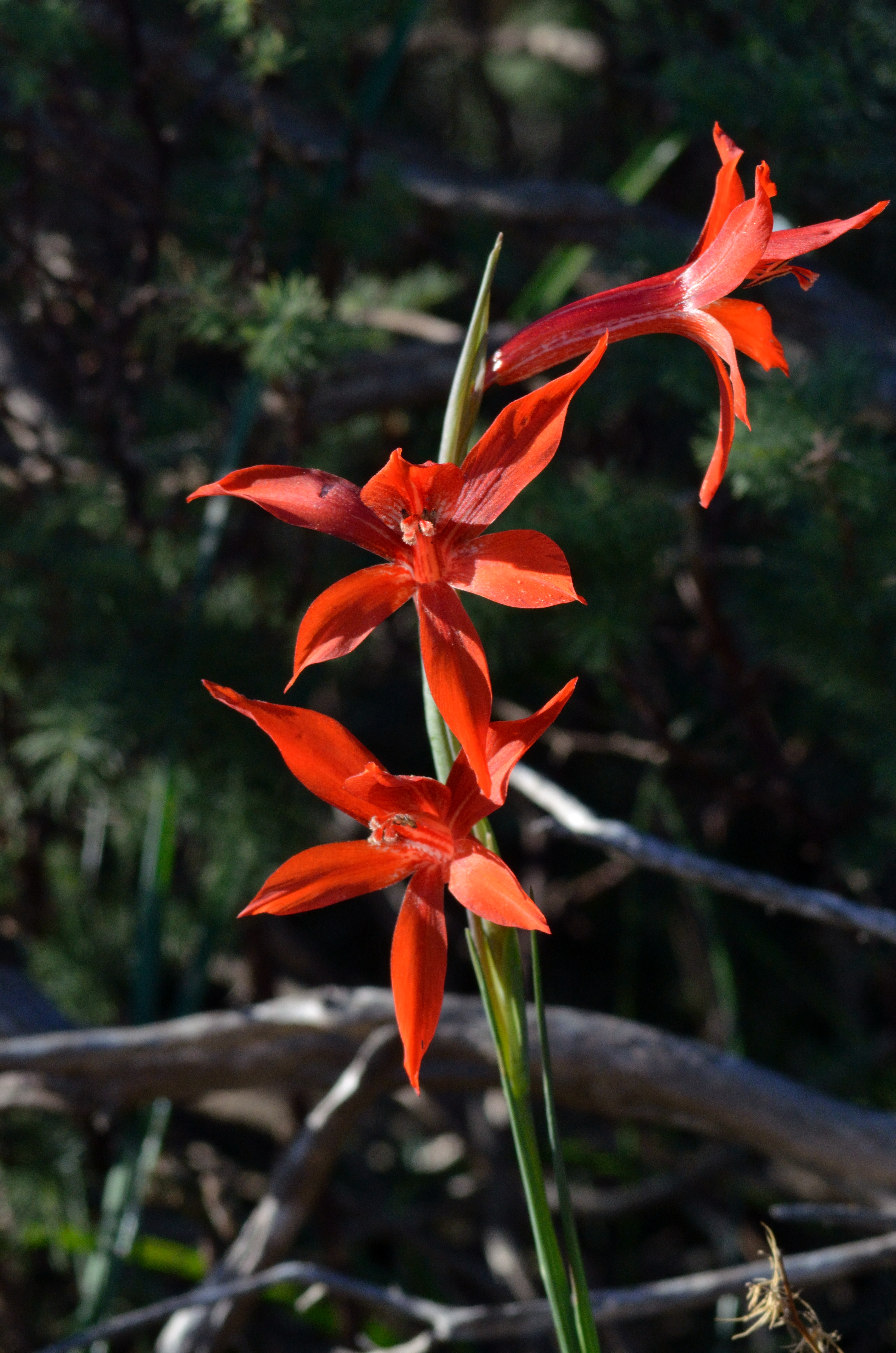 Gladiolus watsonius